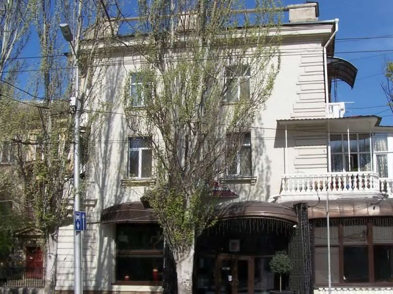 ул. Гоголя 6